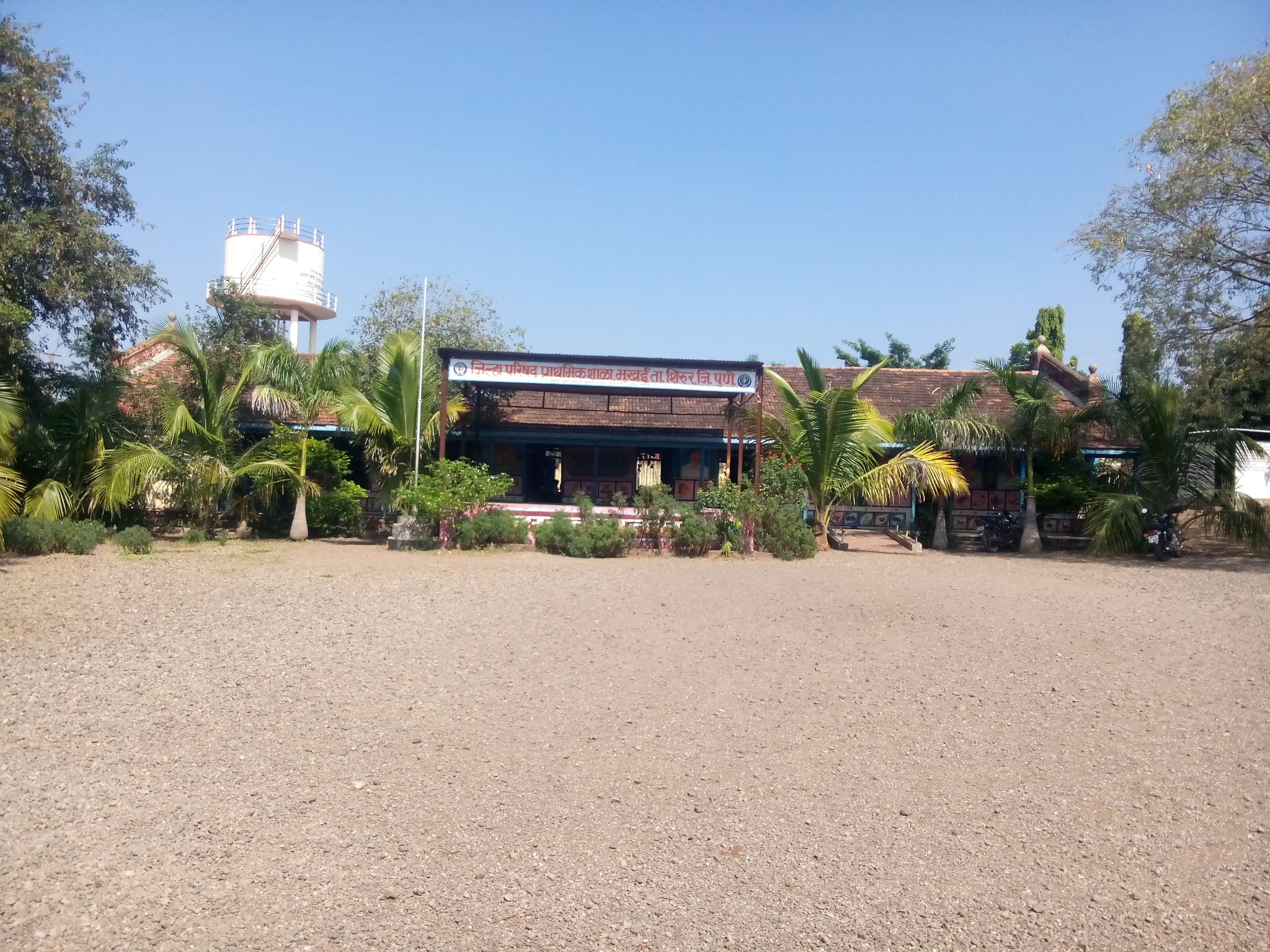 photo